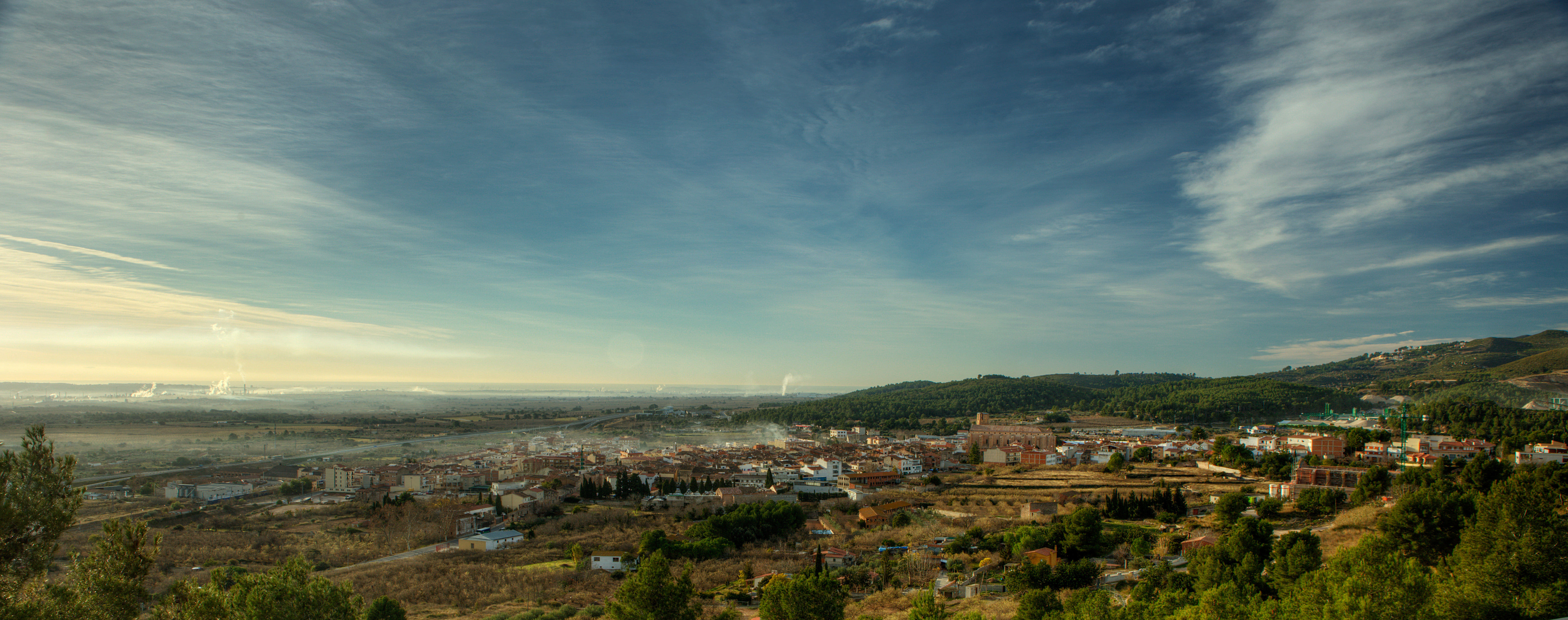 Panorama von Alcover (Tarragona)